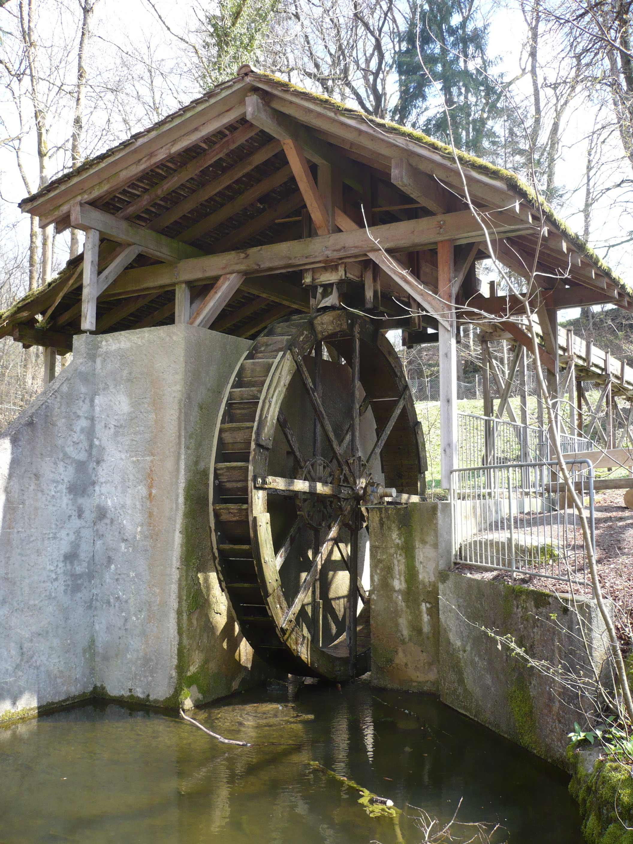 Mühlrad bei der Mühle Trichtenhausen